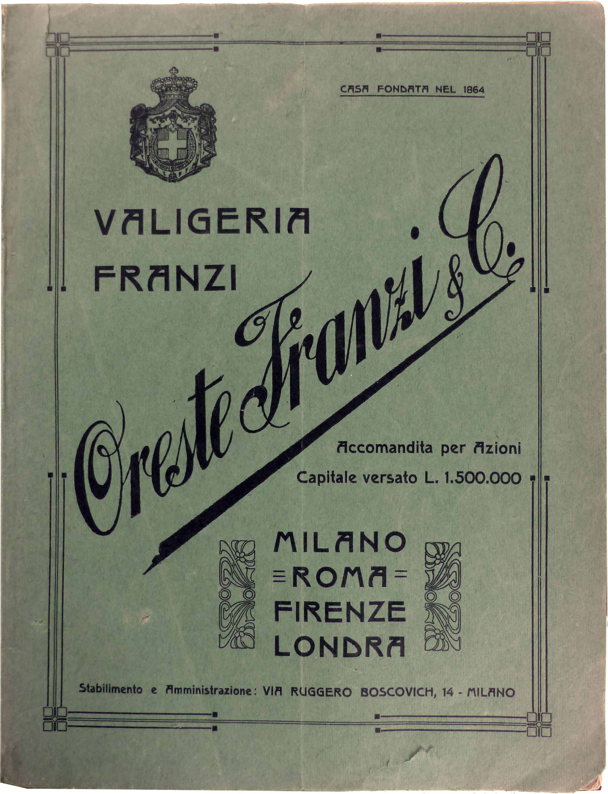 Fotografia alla copertina del catalogo "Valigeria Franzi" del 1909